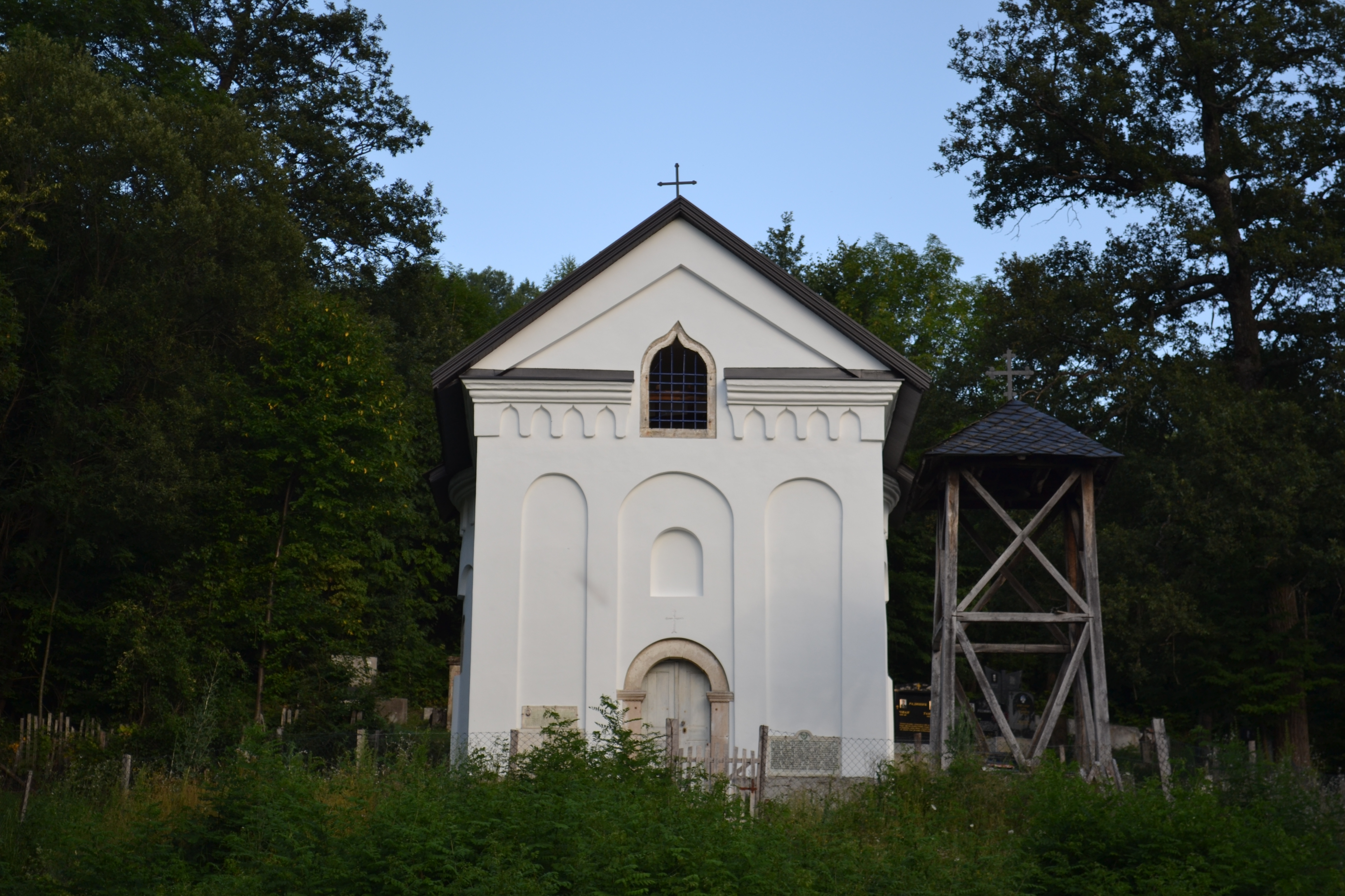 Crkva Sv. Save Srpskog u Milandži (opština Ivanjica)